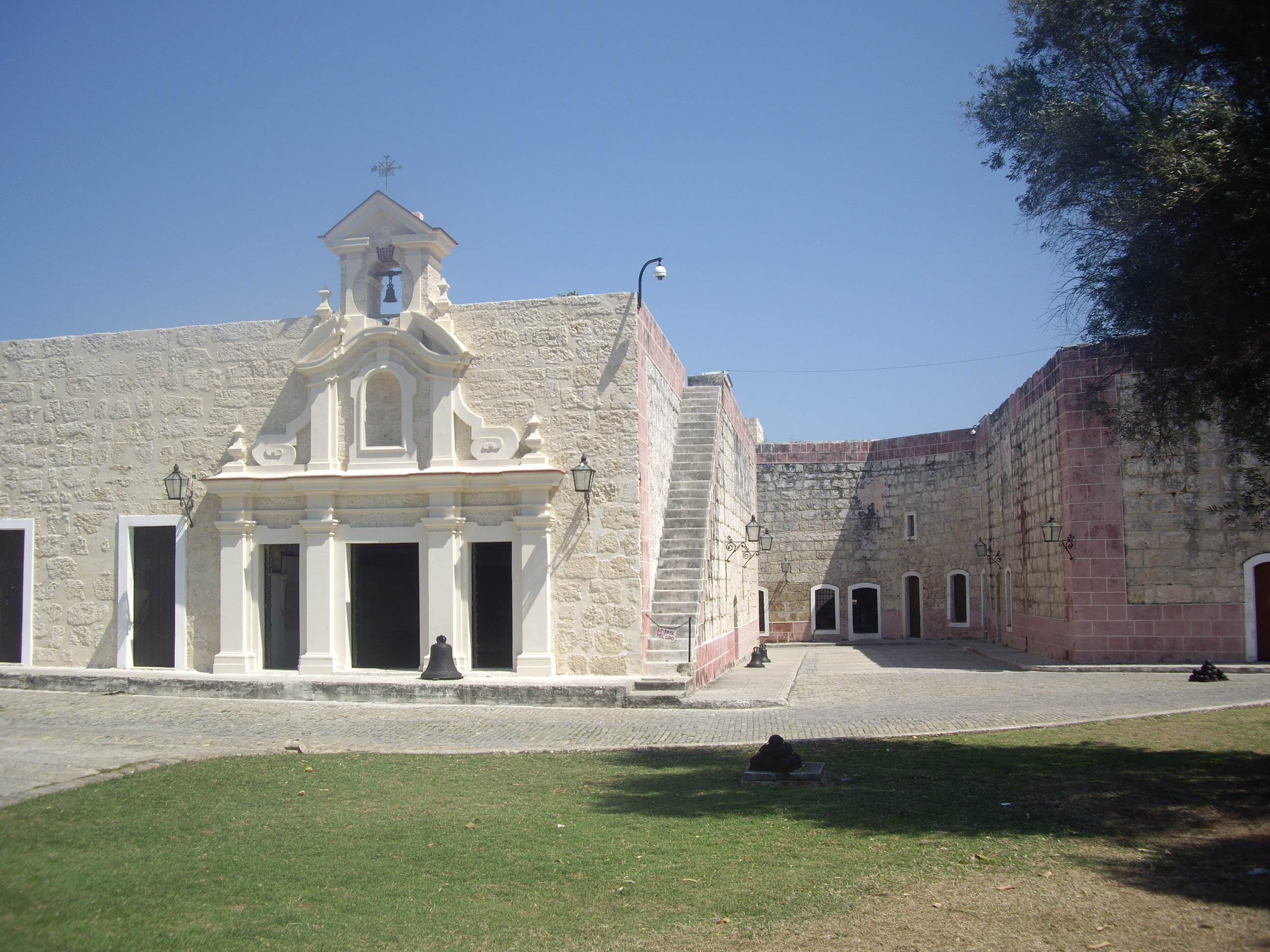 Capella de la Fortalesa de San Carlos de la Cabaña